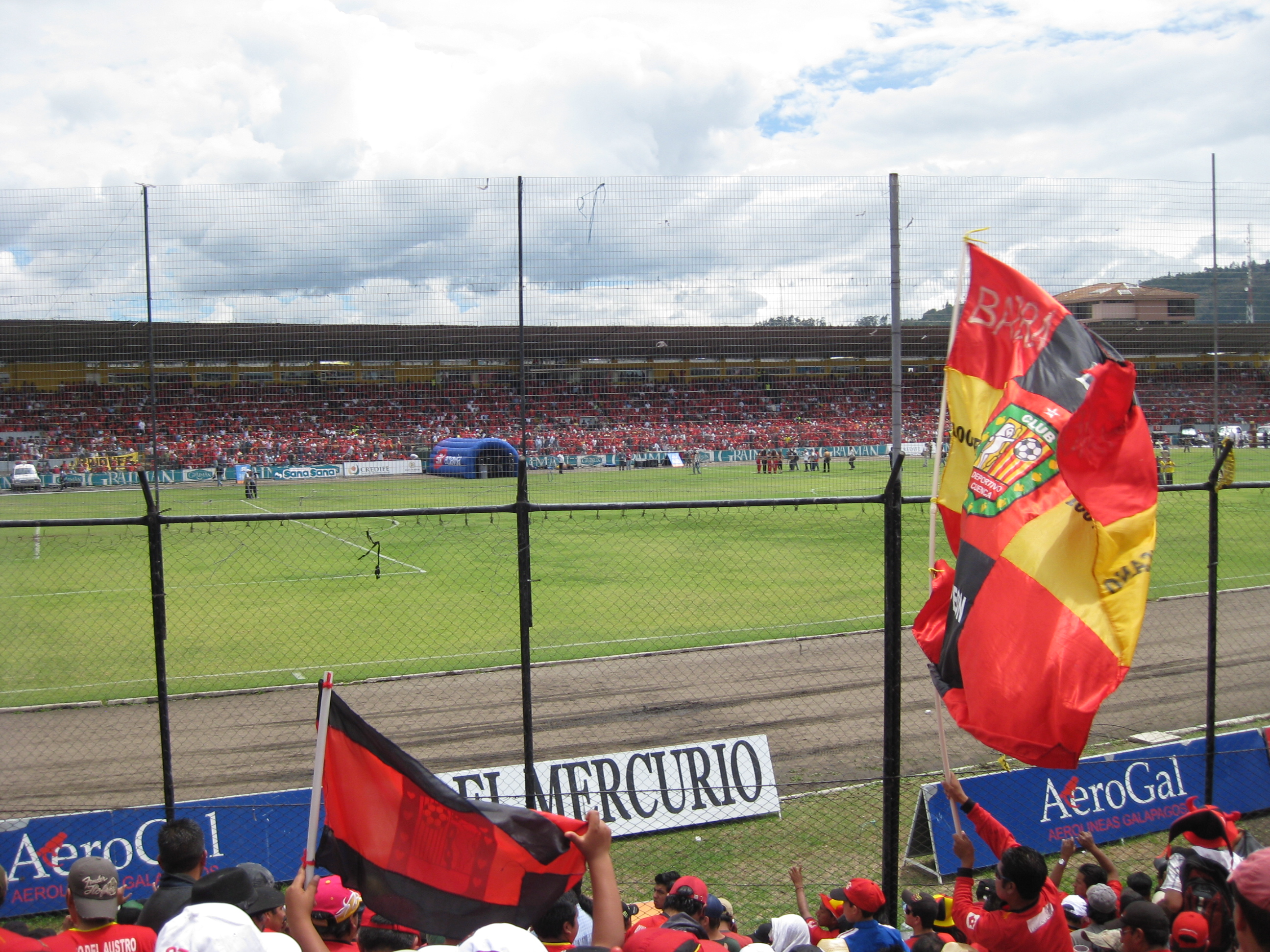 Estadio Alejandro Serrano Aguilar, sede del Club Deportivo Cuenca, Ecuador.